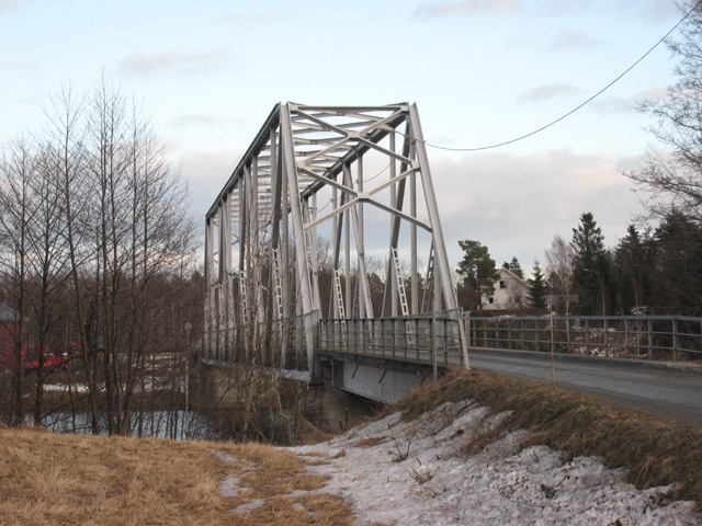 Fv161 fra Furre bru til 42 Ovelandsdalen i Froland. (Faktisk Furre bru på Fv172.)